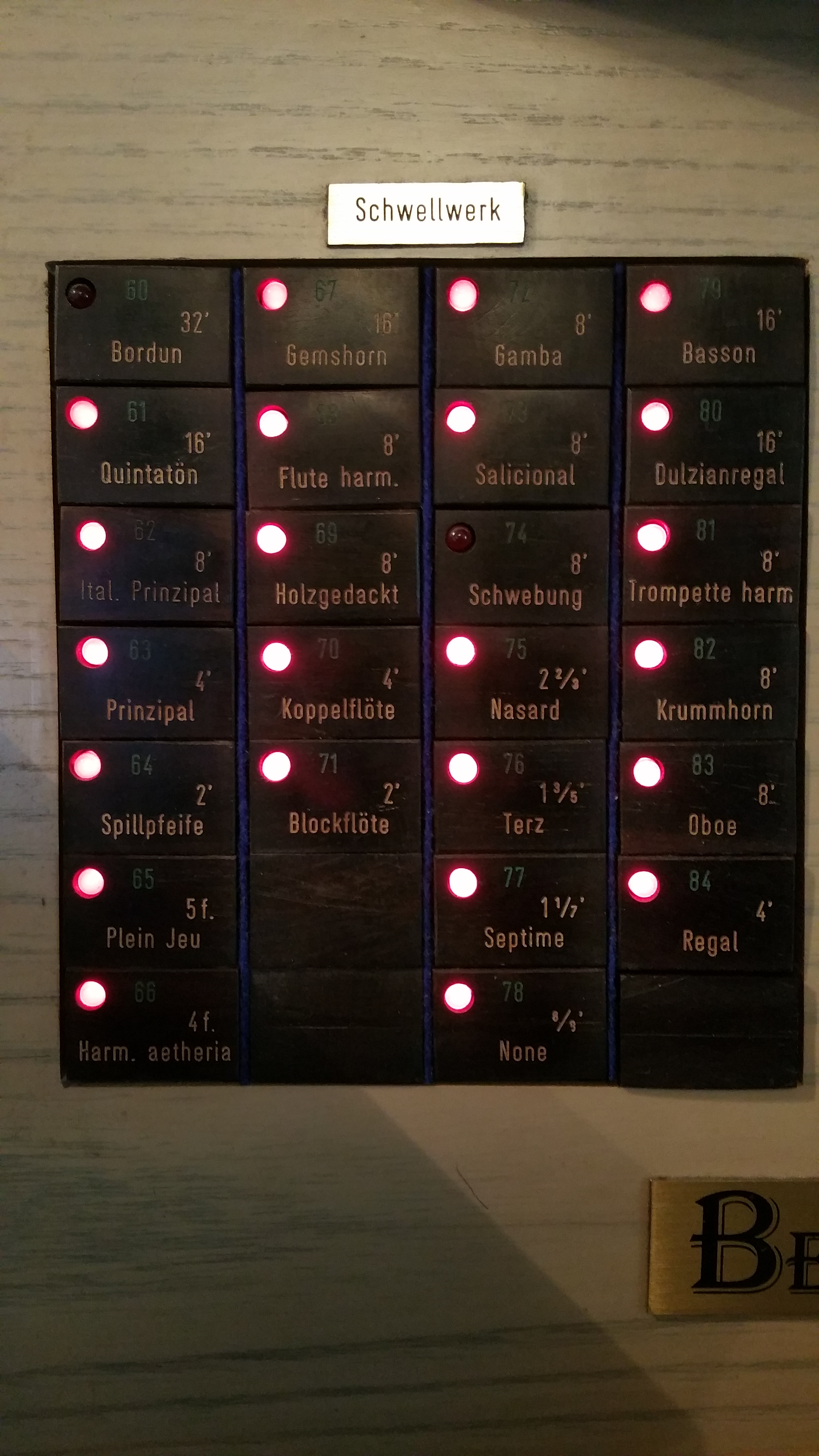 Nahaufnahme der Registertaster des Schwellwerks der Orgel, evangelische Immanuel-Kirche Dortmund Marten